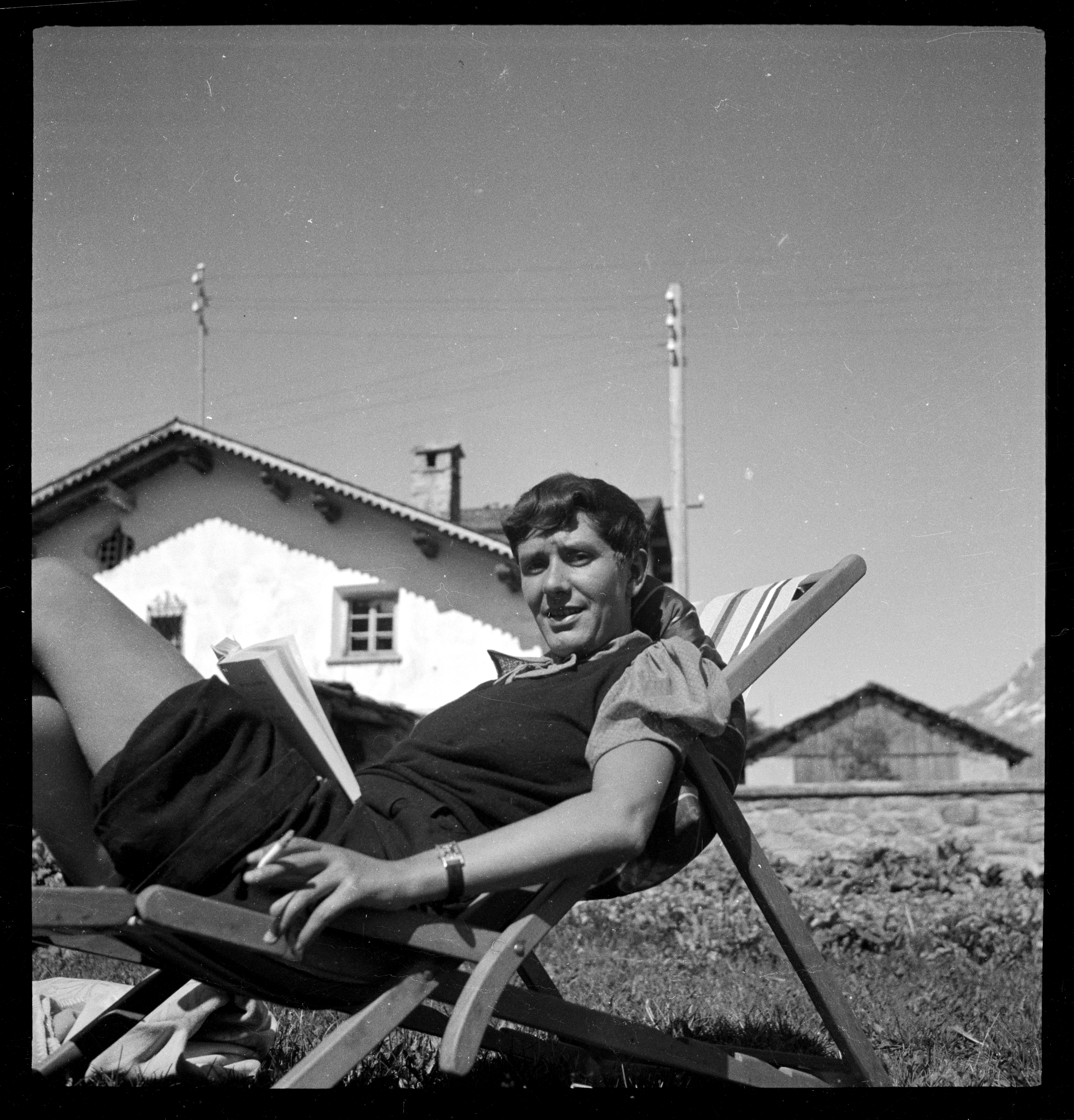 Schweiz, Sils: Menschen; Erika Mann sitzend vor der Chesa Jäger; Segl